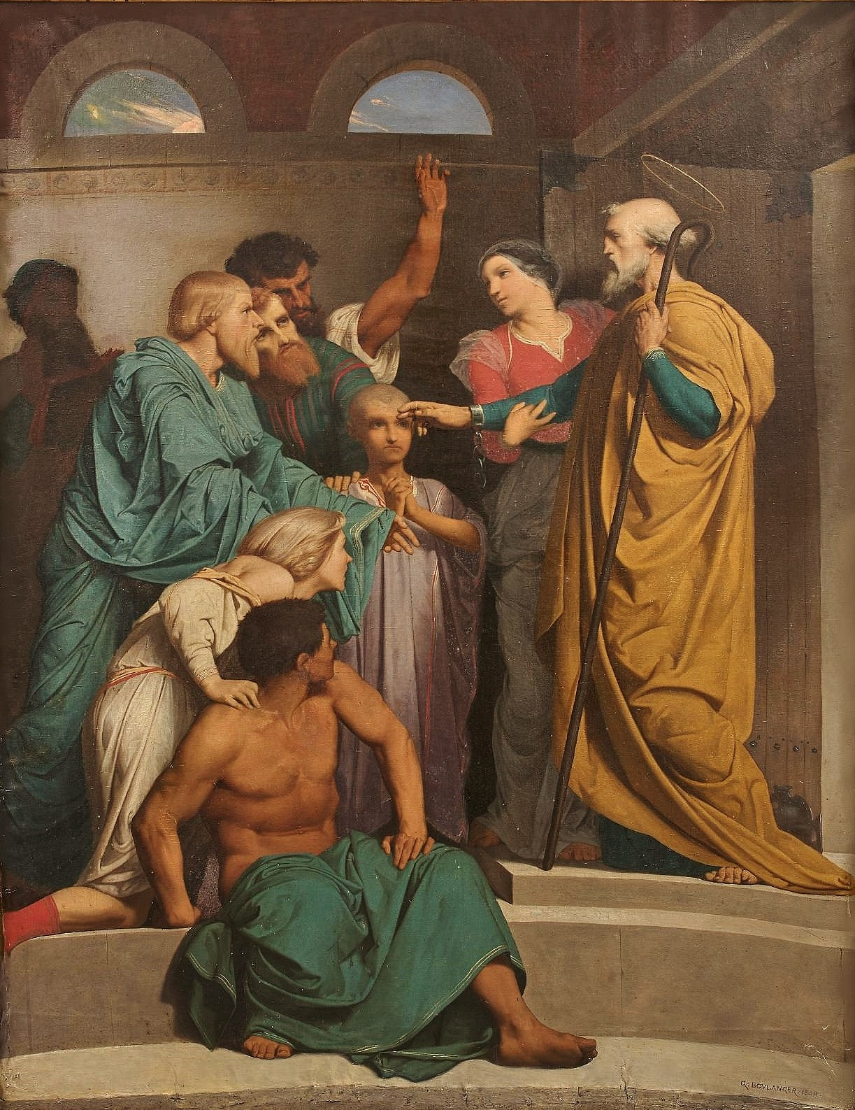 Gustave Boulanger, Saint Pierre chez Marie, 1848, collection particulière